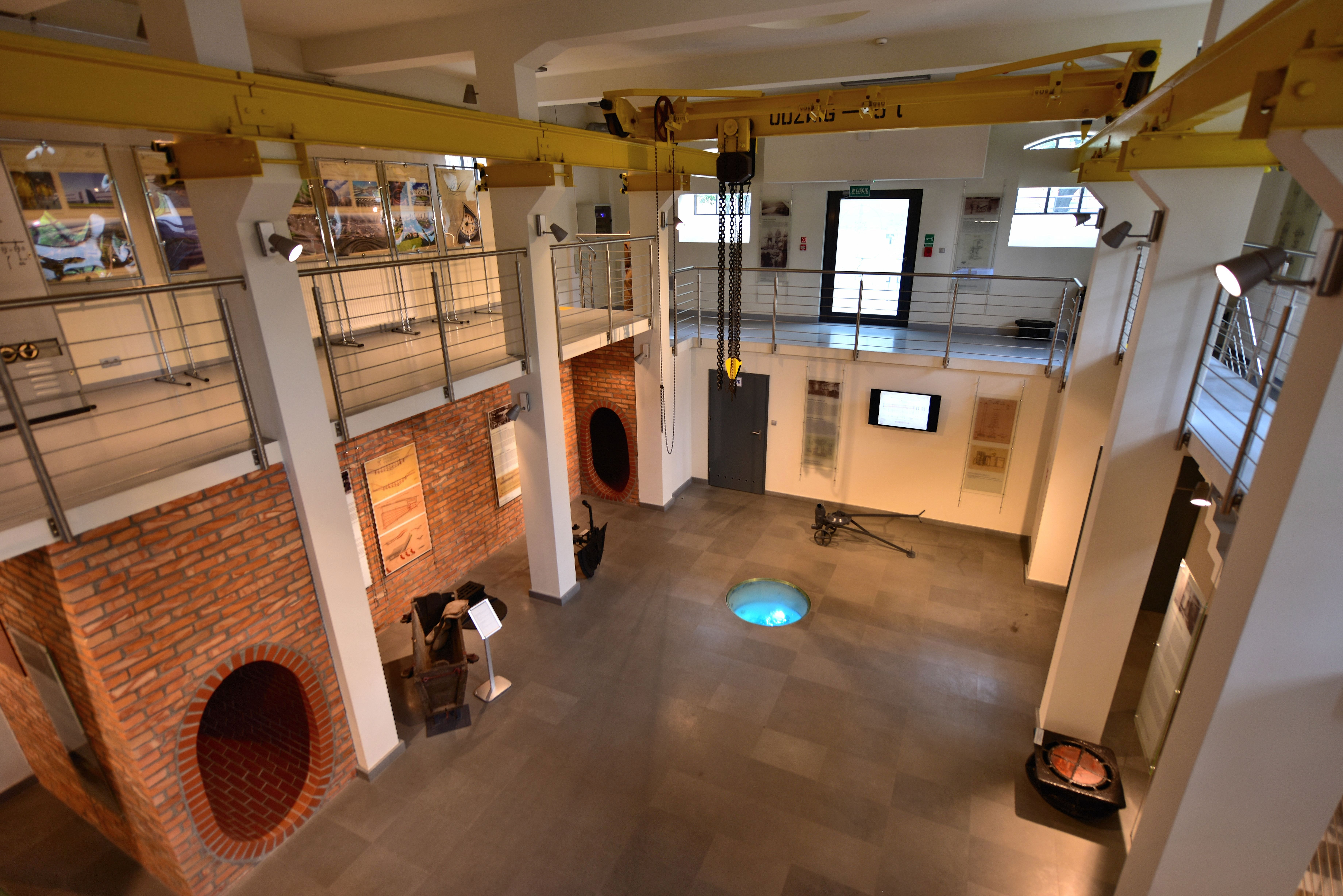 Muzeum Wodociągów i Kanalizacji w budynku technicznym nr 2 a terenie Stacji Filtrów w Warszawie